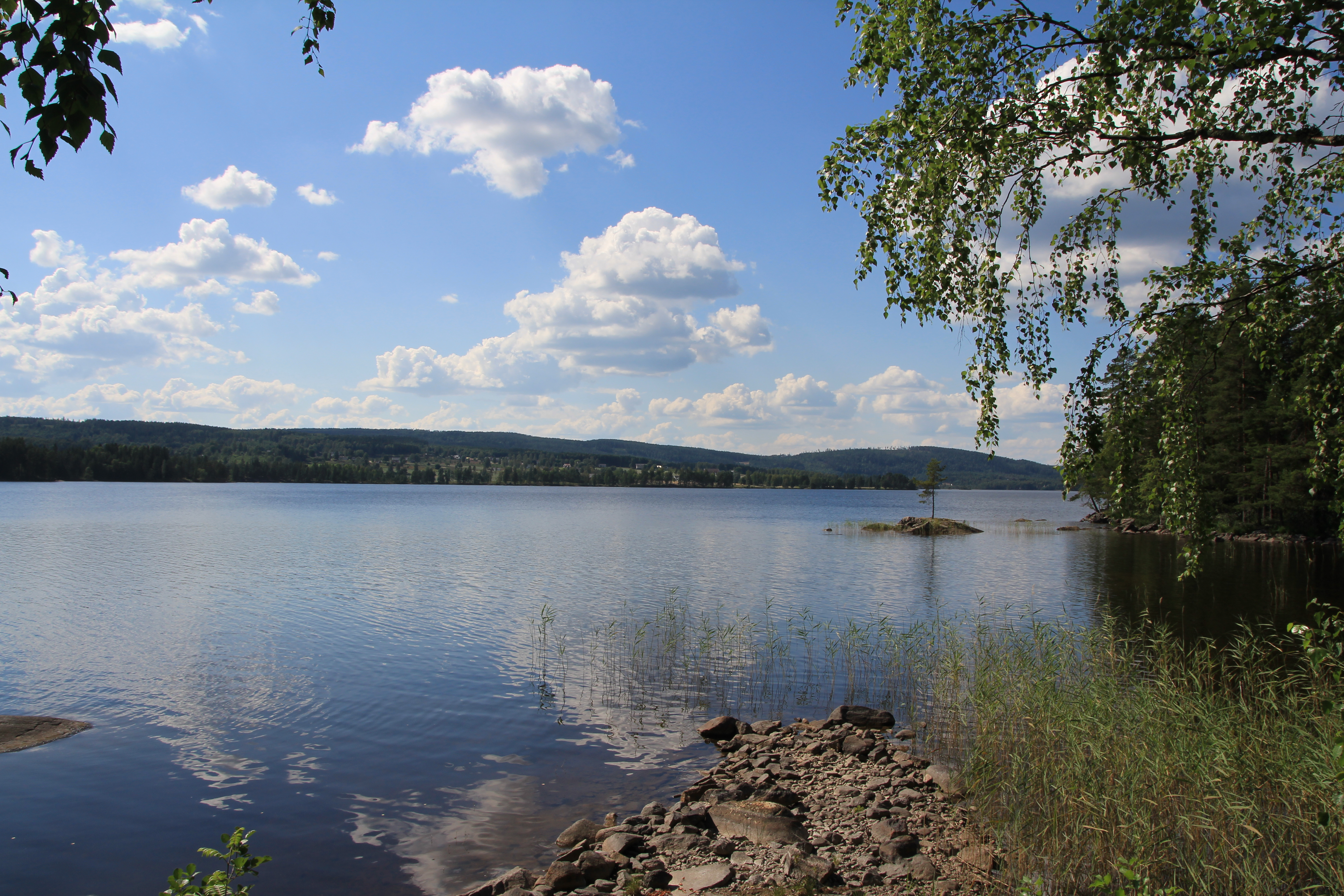 Rømsjøen er en innsjø som ligger i tidligere Rømskog kommune i Østfold, fra 2020 i Aurskog-Høland kommune i Viken.